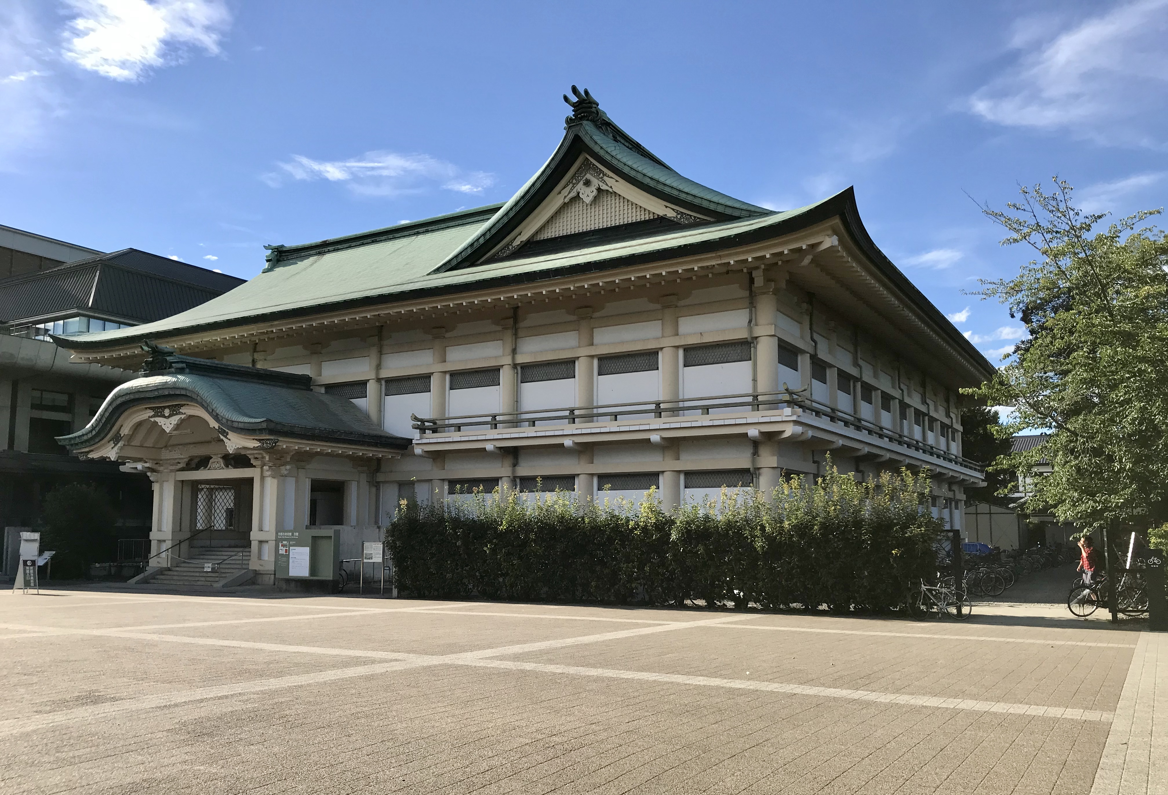 京都市京セラ美術館（京都市美術館）別館